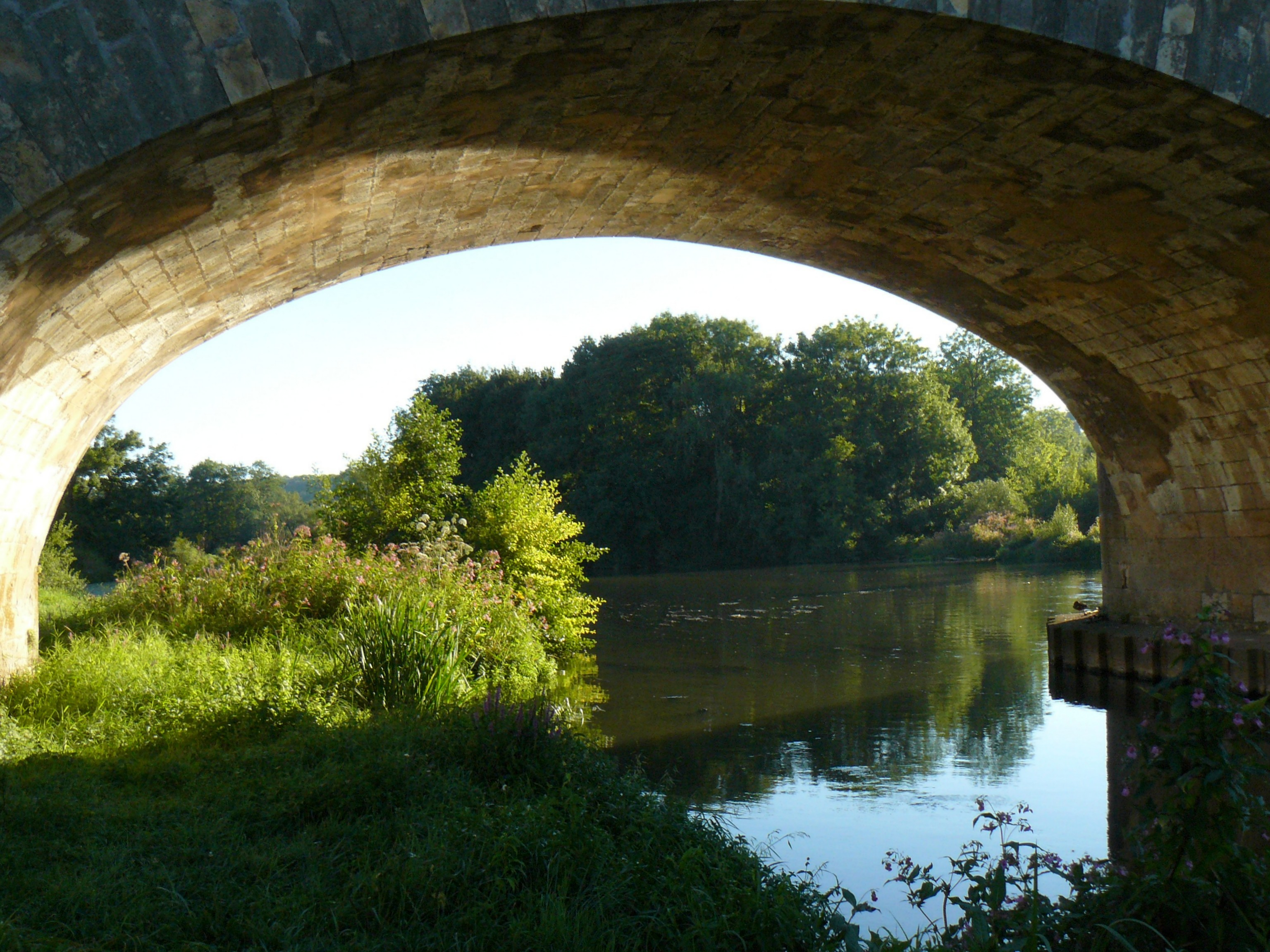 La Saône vue sous une arche du pont de Port-sur-Saône (Haute-Saône, France)